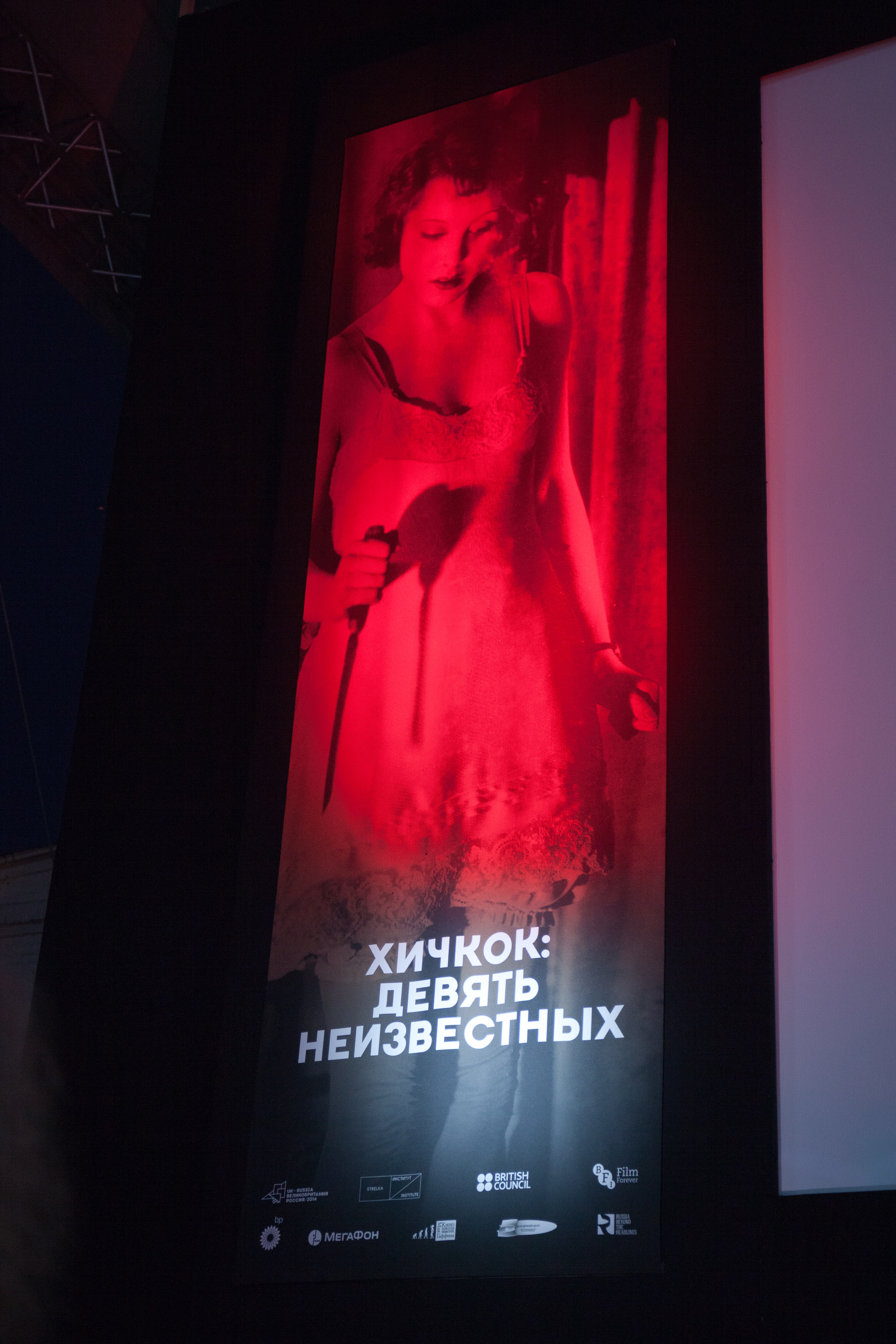 Фестиваль "Хичкок: девять неизвестных" в Москве.